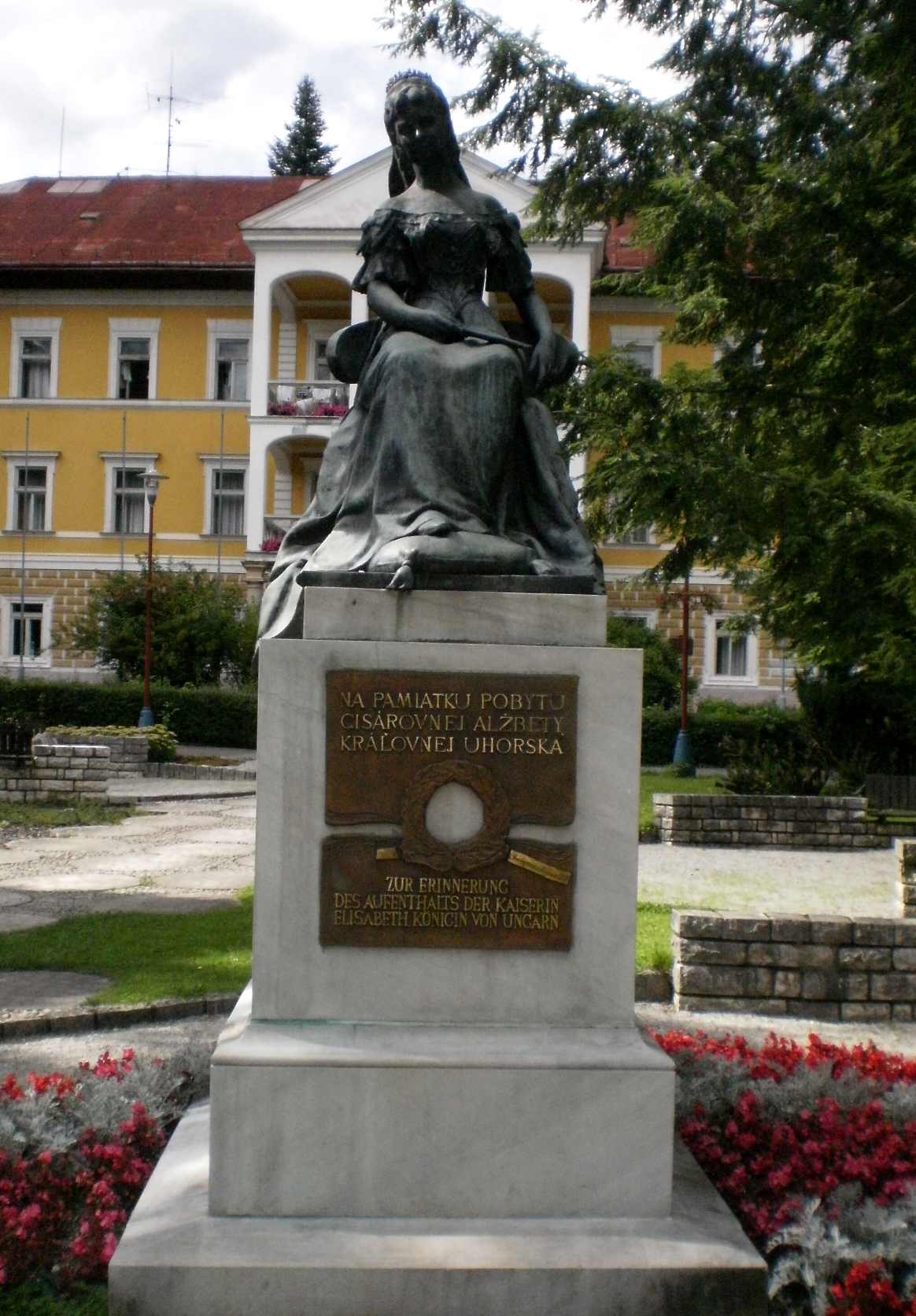 Socha - Alžbeta (Sissi) - Bardejovské kúpele